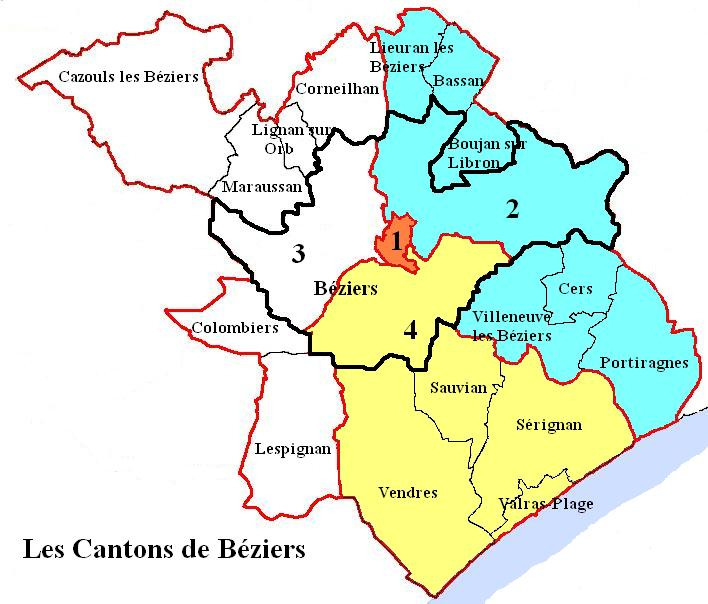 Les cantons de Béziers Image personnelle